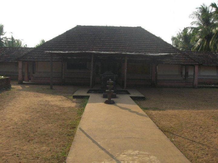 കരിവെള്ളൂർ ക്ഷേത്രം നാലമ്പലം, ബലിക്കൽപ്പുര